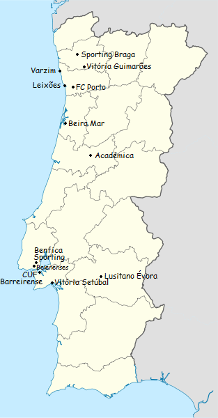 Carta dos clubes participantes do campeonato de portugal de futebol de primeira divisao 1965-1966